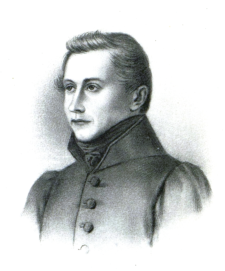 Фон-дер-Бригген, Александр Фёдорович